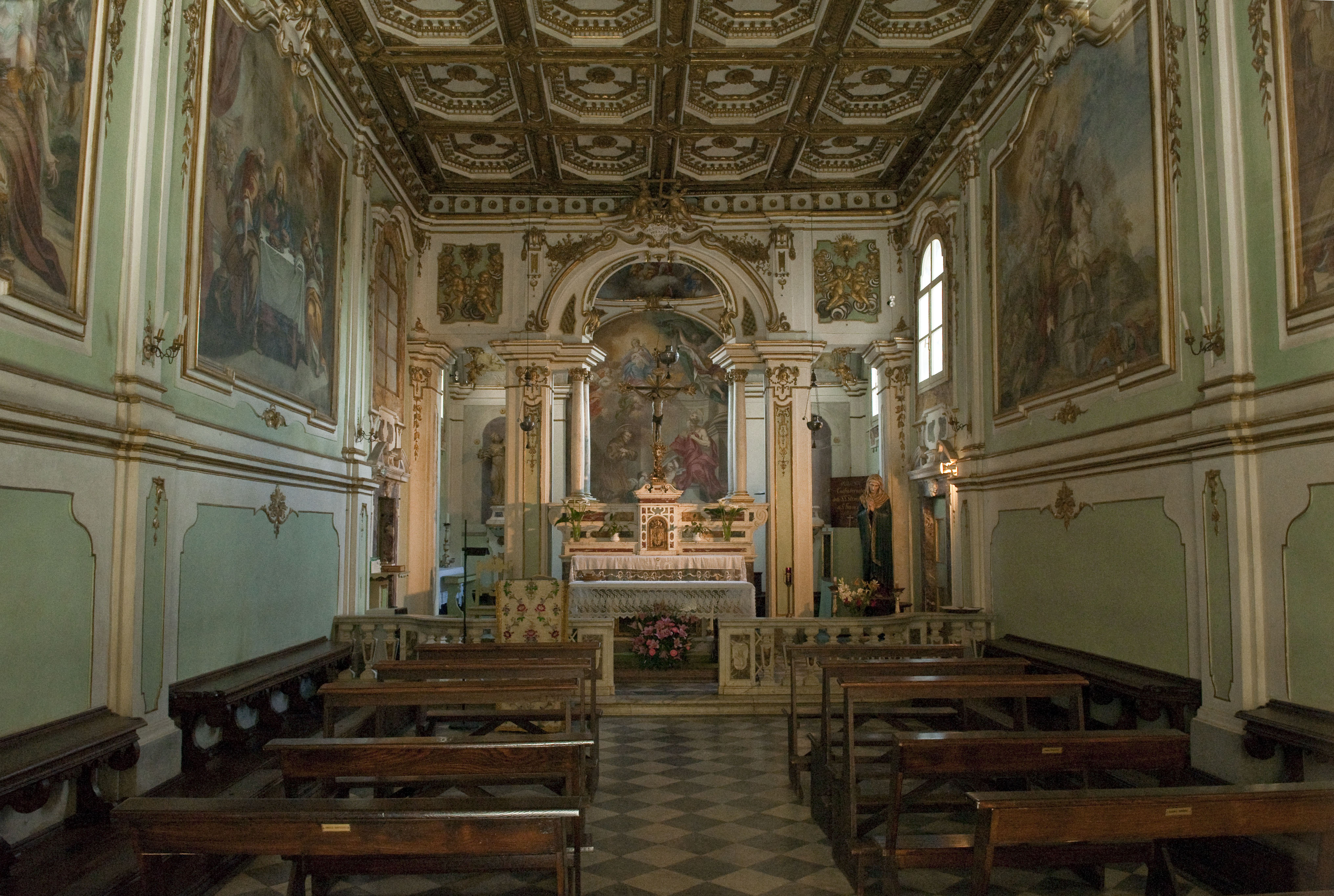 Interno dell'Oratorio di San Francesco a Bibbiena - Arezzo